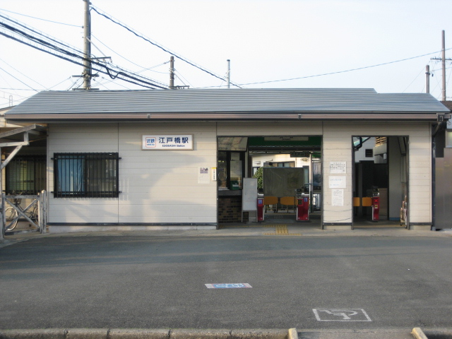 江戸橋駅